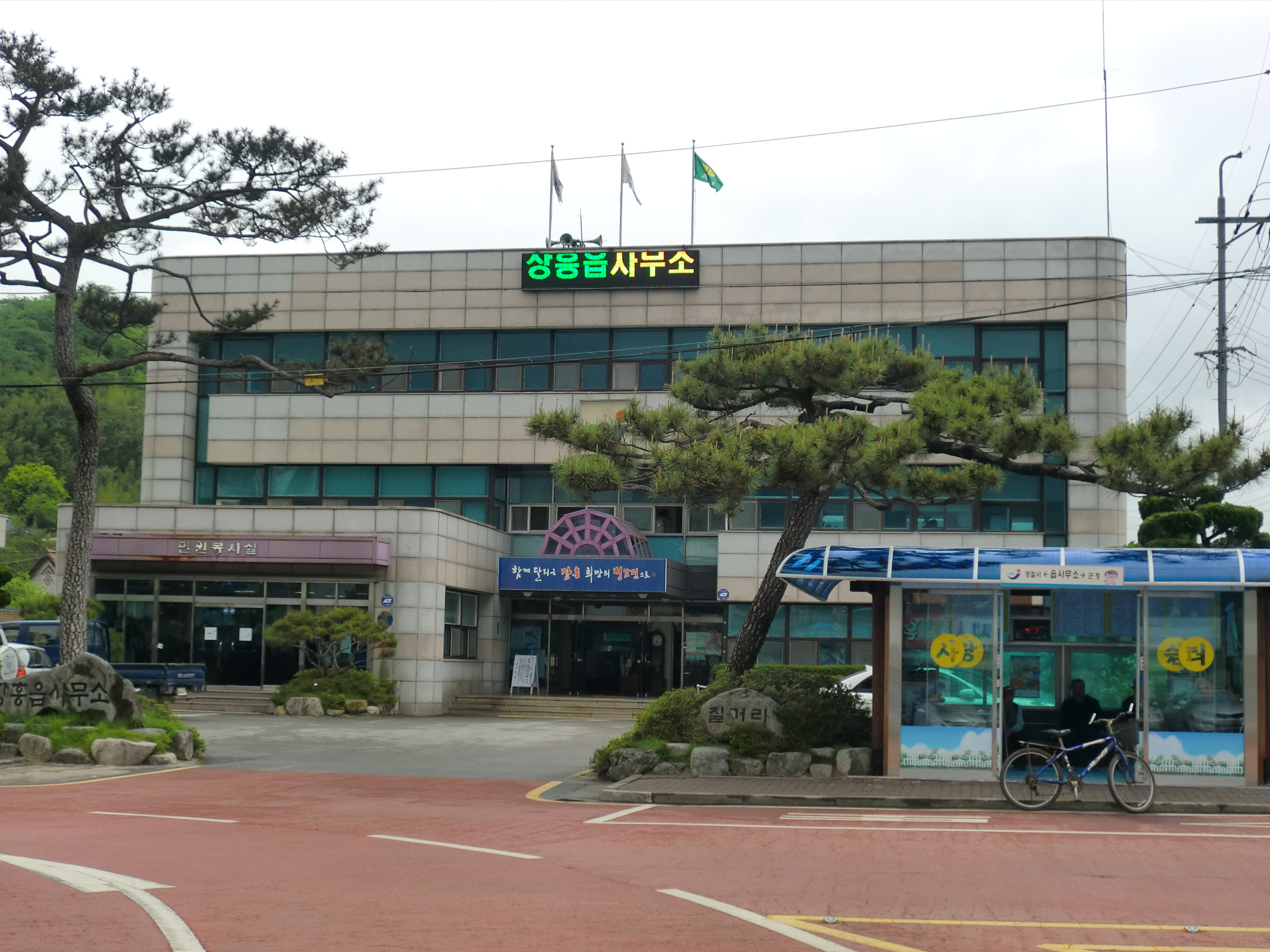 전라남도 장흥군 장흥읍에 있는 장흥읍사무소